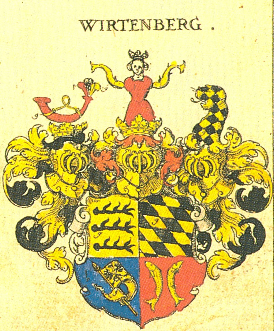 Johann Siebmacher: New Wappenbuch Herzogtum Württemberg eingescannt aus: Horst Appuhn (Hrsg.), Johann Siebmachers Wappenbuch. Die bibliophilen Taschenbücher 538, 2. verb. Aufl , Dortmund 1989